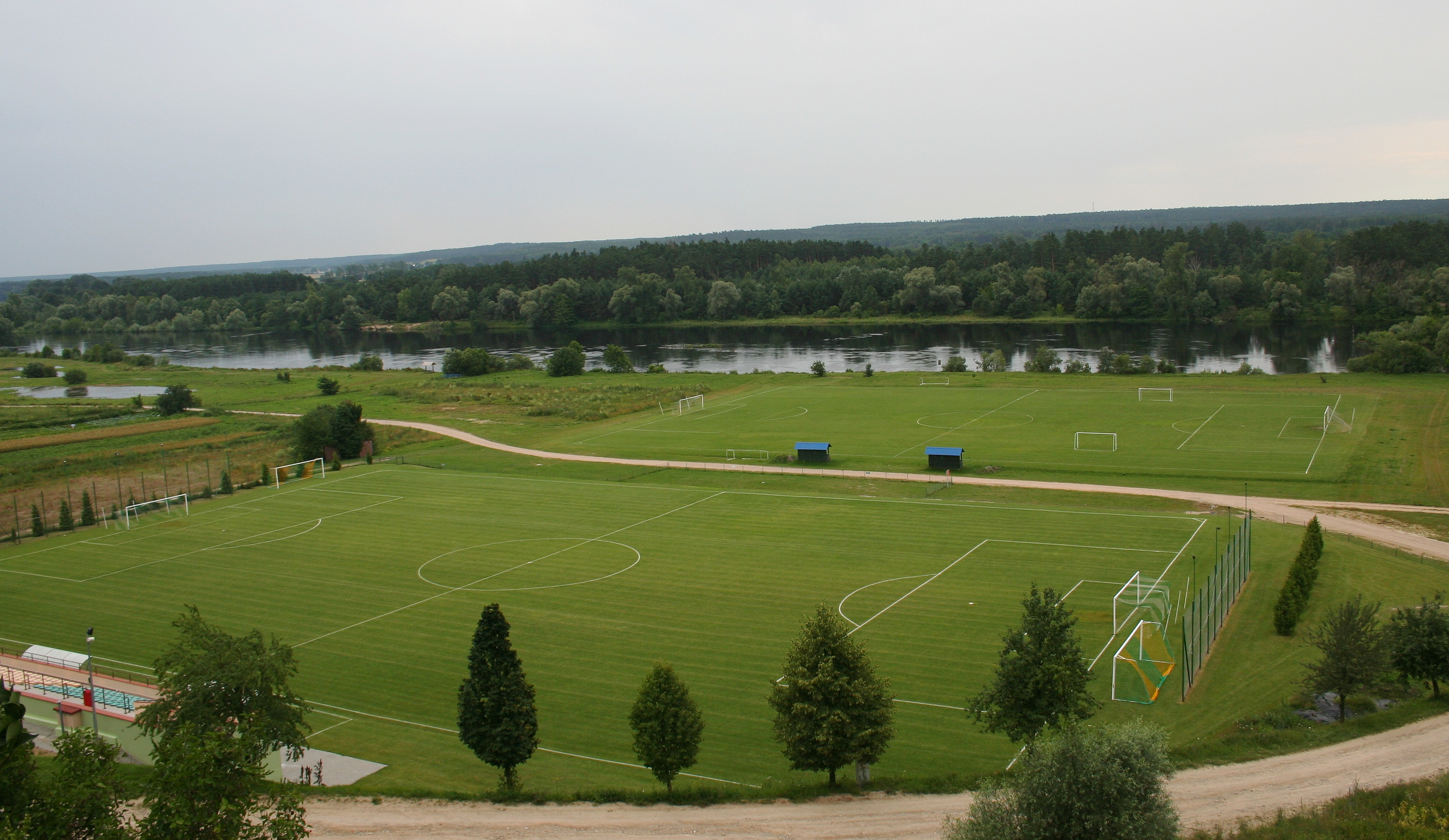 Mielnik, woj. podlaskie - widok na boiska sportowe i rzekę Bug z Góry Zamkowej